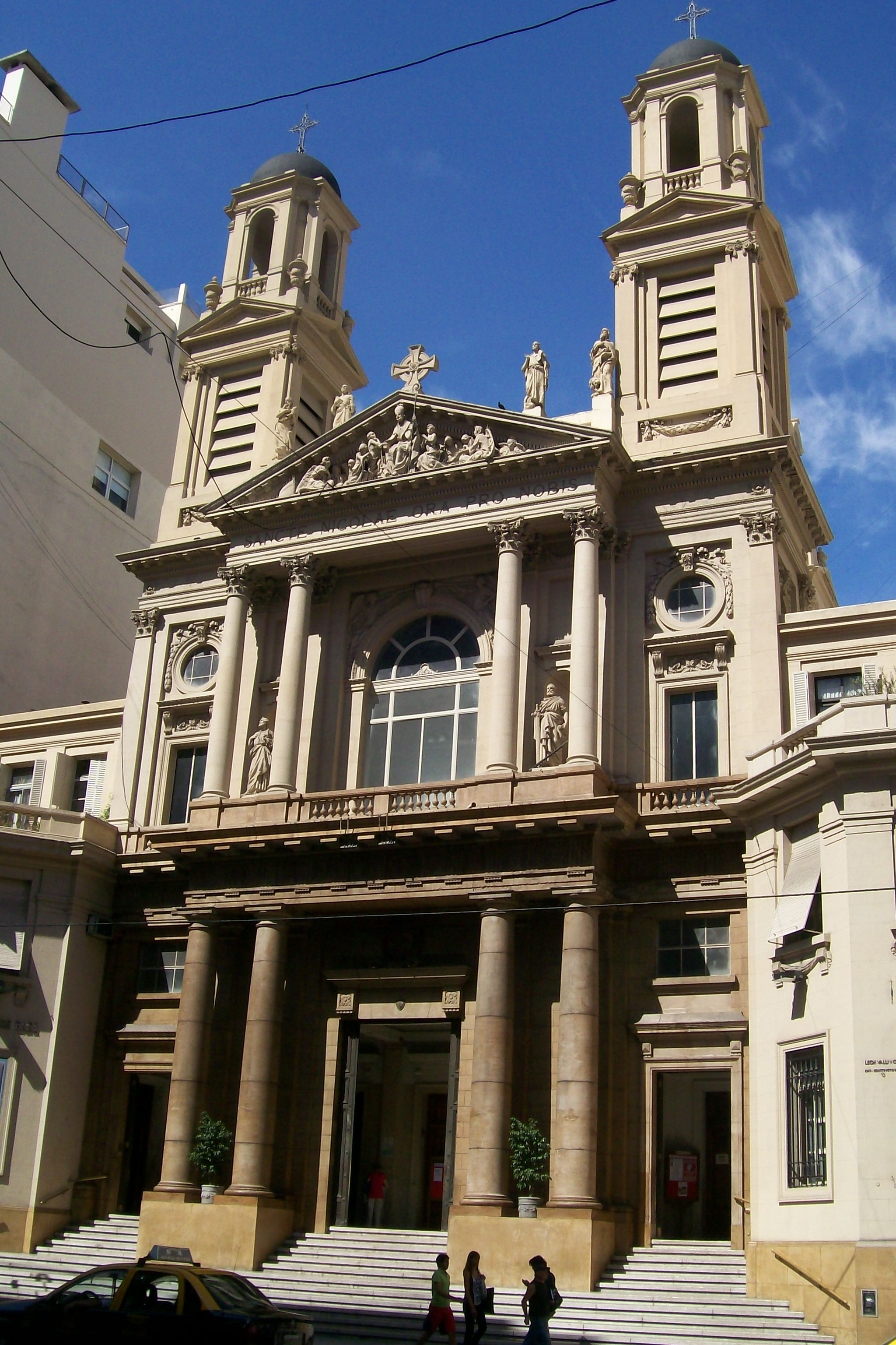 Iglesia de San Nicolás, Buenos Aires